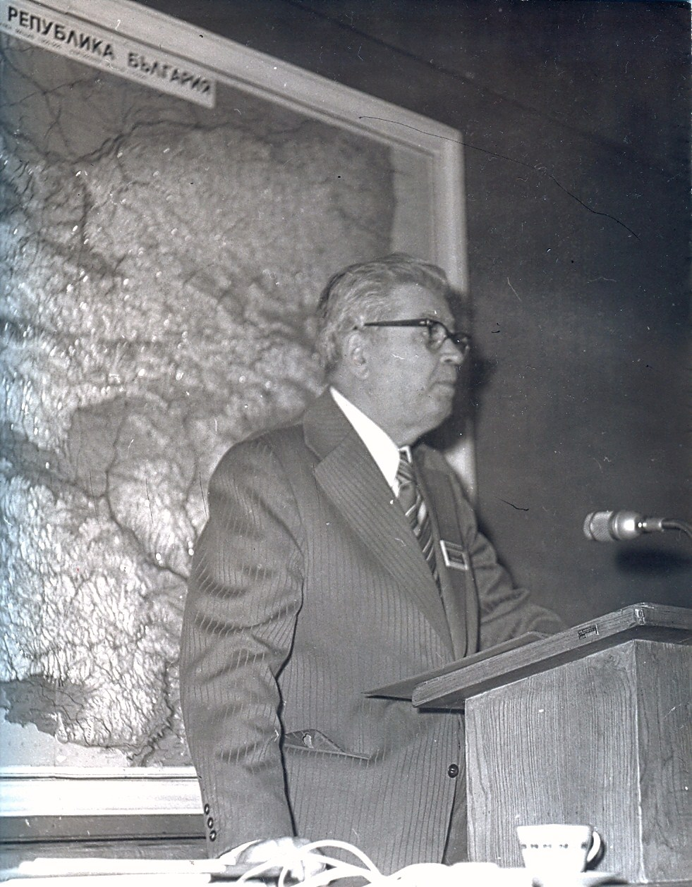 Професор Васил Цанков с изказване на симпозиум "Юра, Креда" проведен на 30 май 1977 година в Софийския университет.